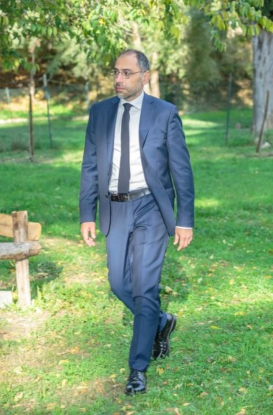 Lacorazza Piero a Potenza cammina nel parco